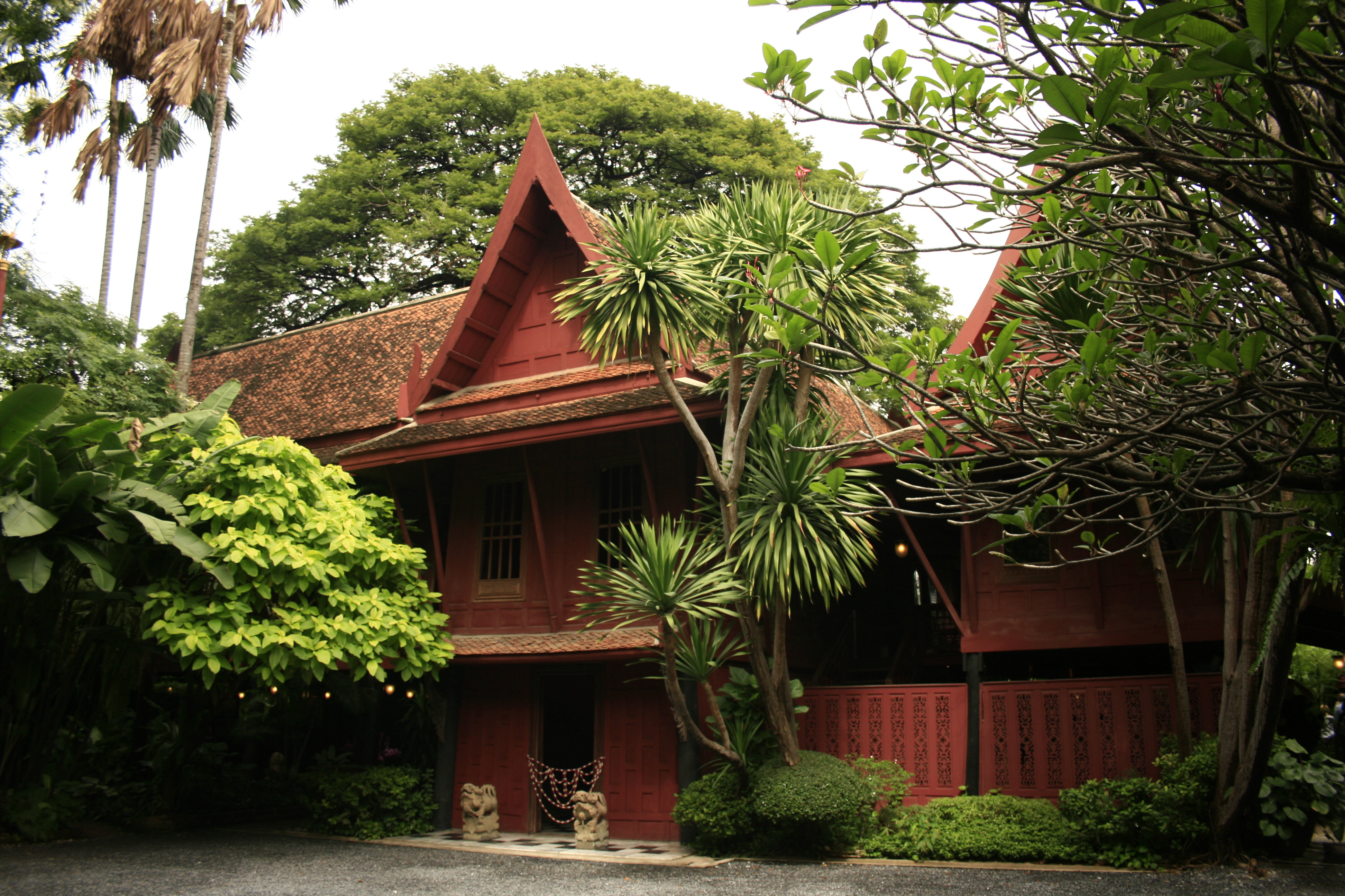 La maison de Jim Thompson à Bangkok